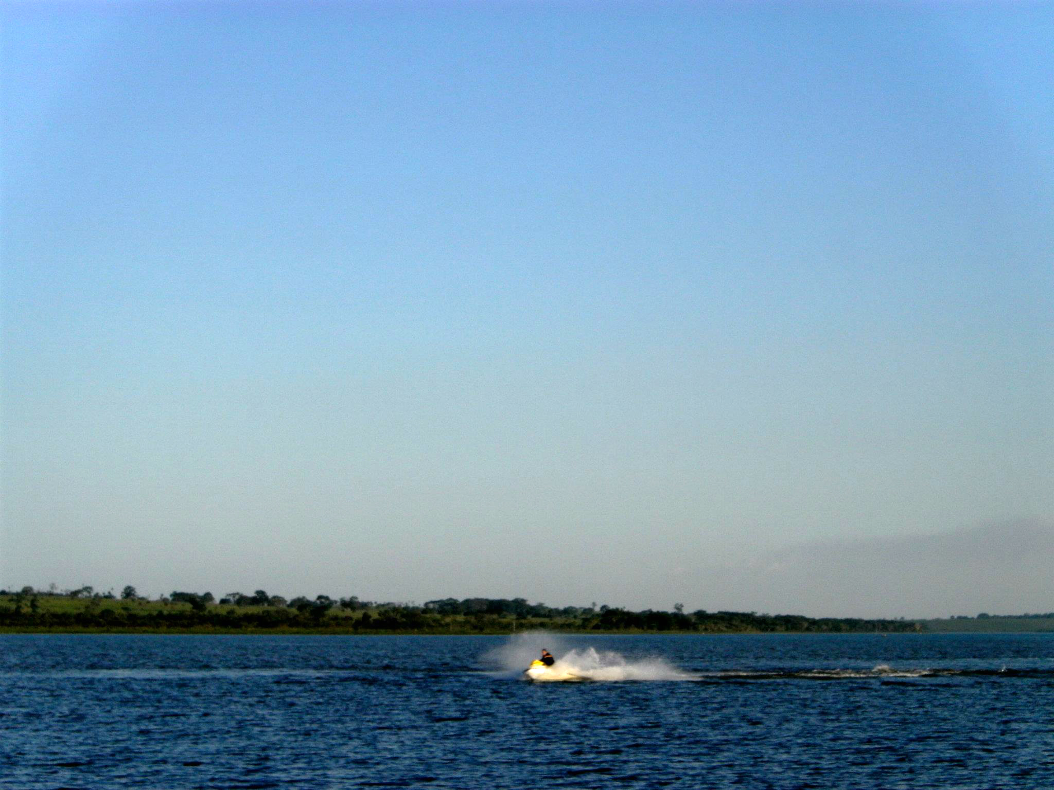 Jetski no rio Tiêtê em Araçatuba-SP